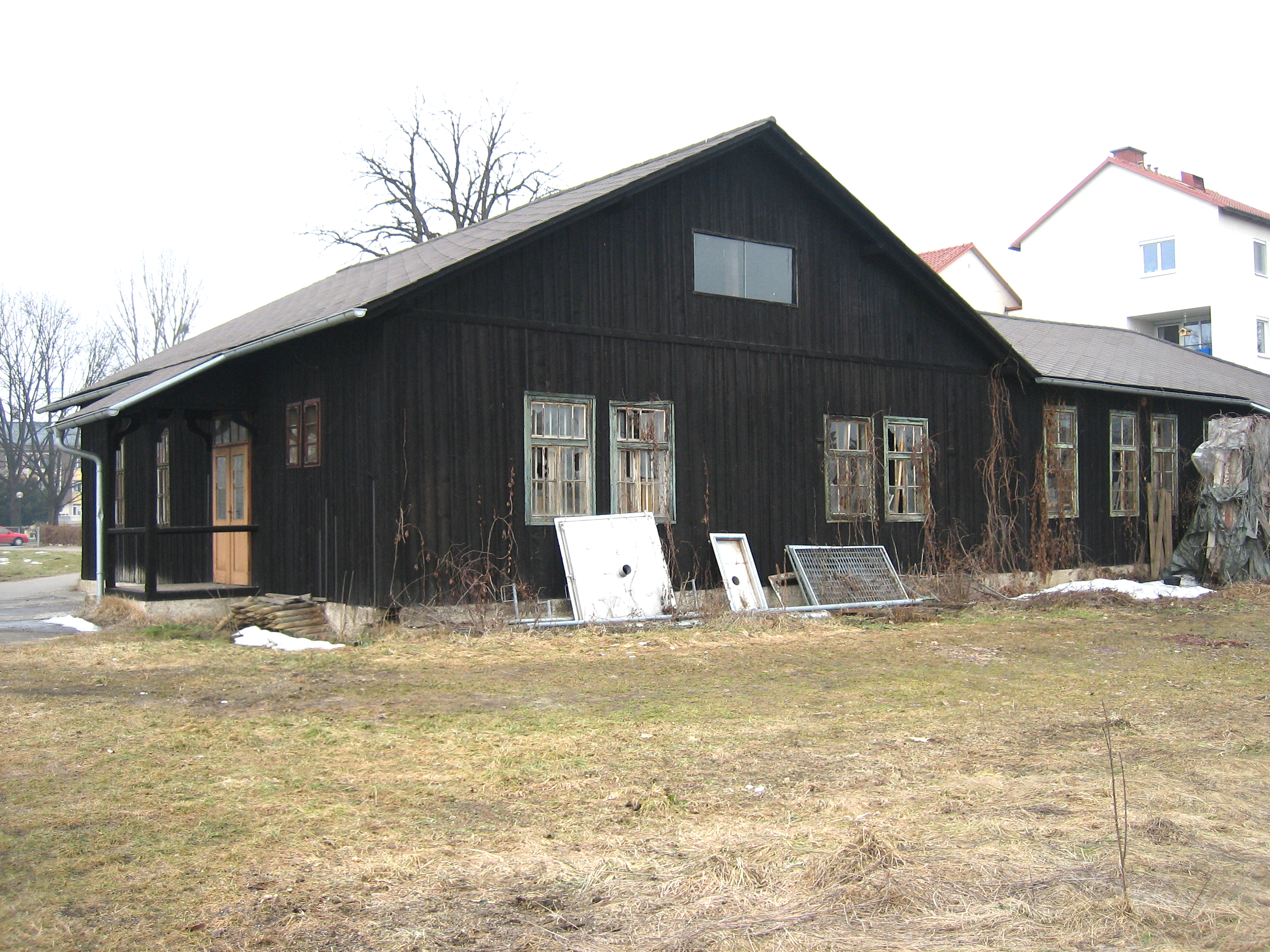 Baracke des ehem. Flüchtlingslagers Wagna